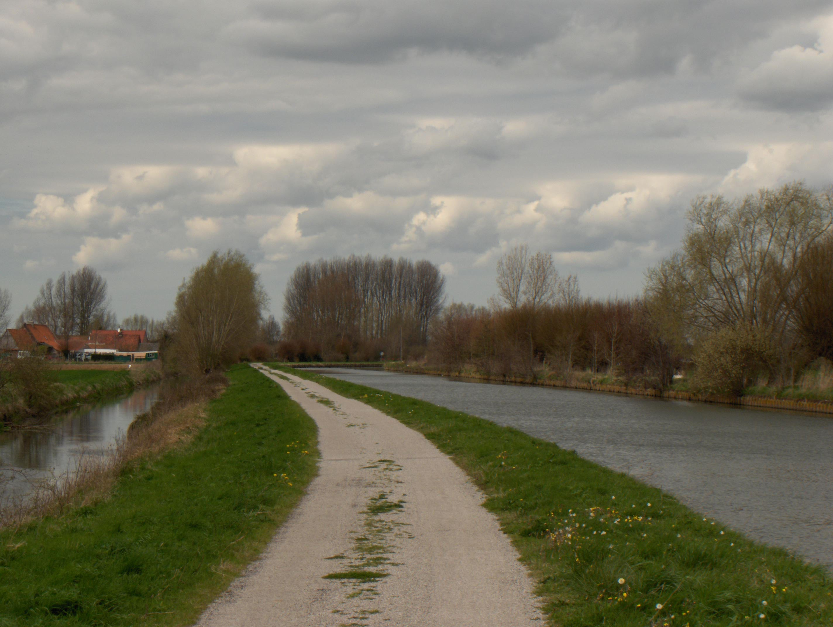 Die Leie (nl.)/Lys (frz.) stromaufwärts in der Nähe von Thiennes (Frankreich, Dept. Nord) und Saint-Venant (Dept. Pas-de-Calais). Kanalisiert.